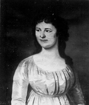 Fürstin Amalie von Anhalt-Bernburg